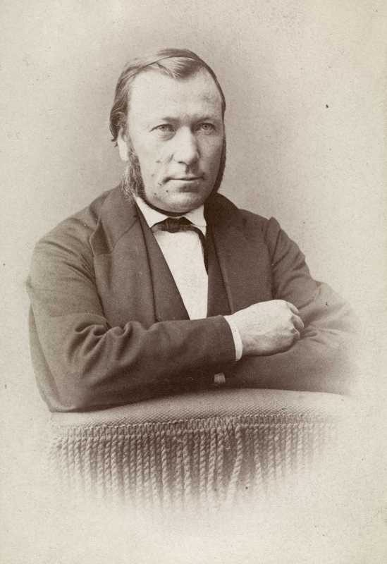 Fiolinisten Fredrik Ursin